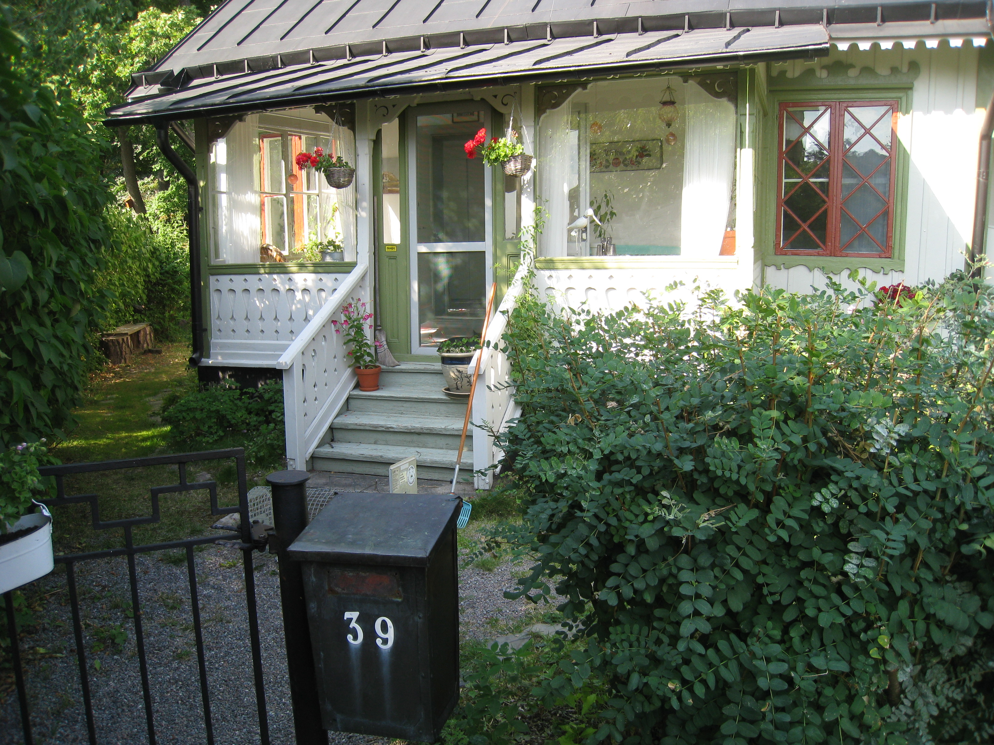 Alphyddan i Äppelviken i Bromma tillhör "Mälarstrandens sommarbebyggelse".